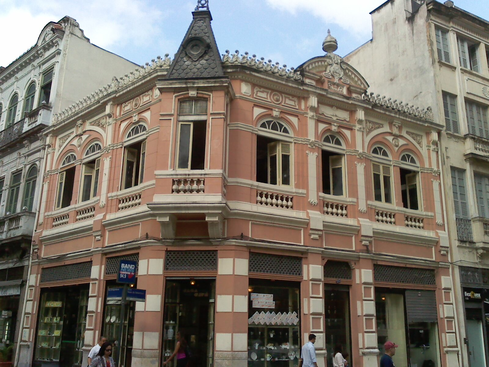 Casa Cavé, centro histórico do Rio de Janeiro, estado do Rio de Janeiro, Brasil: fachada.